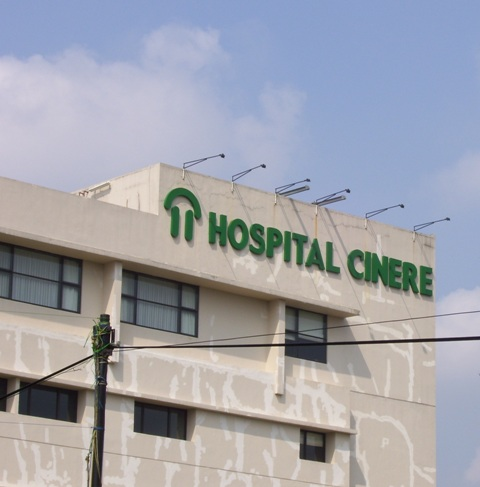 Hospital Cinere